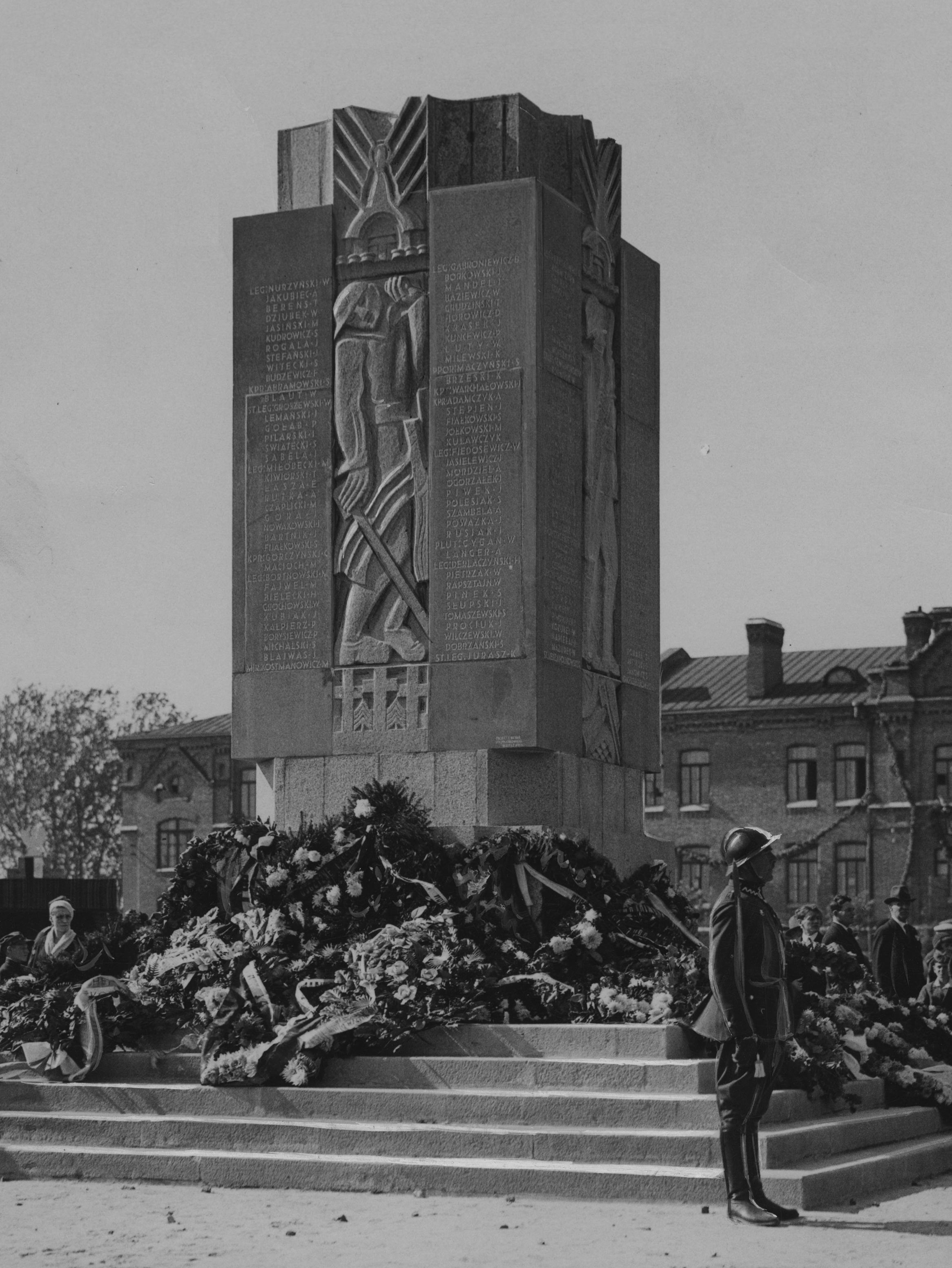 Chełm Lubelski. Pomnik ku czci poległych żołnierzy 7 pułku piechoty Legionów. Odsłonięcie pomnika w 15-lecie istnienia pułku. Koncern Ilustrowany Kurier Codzienny - Archiwum Ilustracji. Sygnatura: 1-U-514